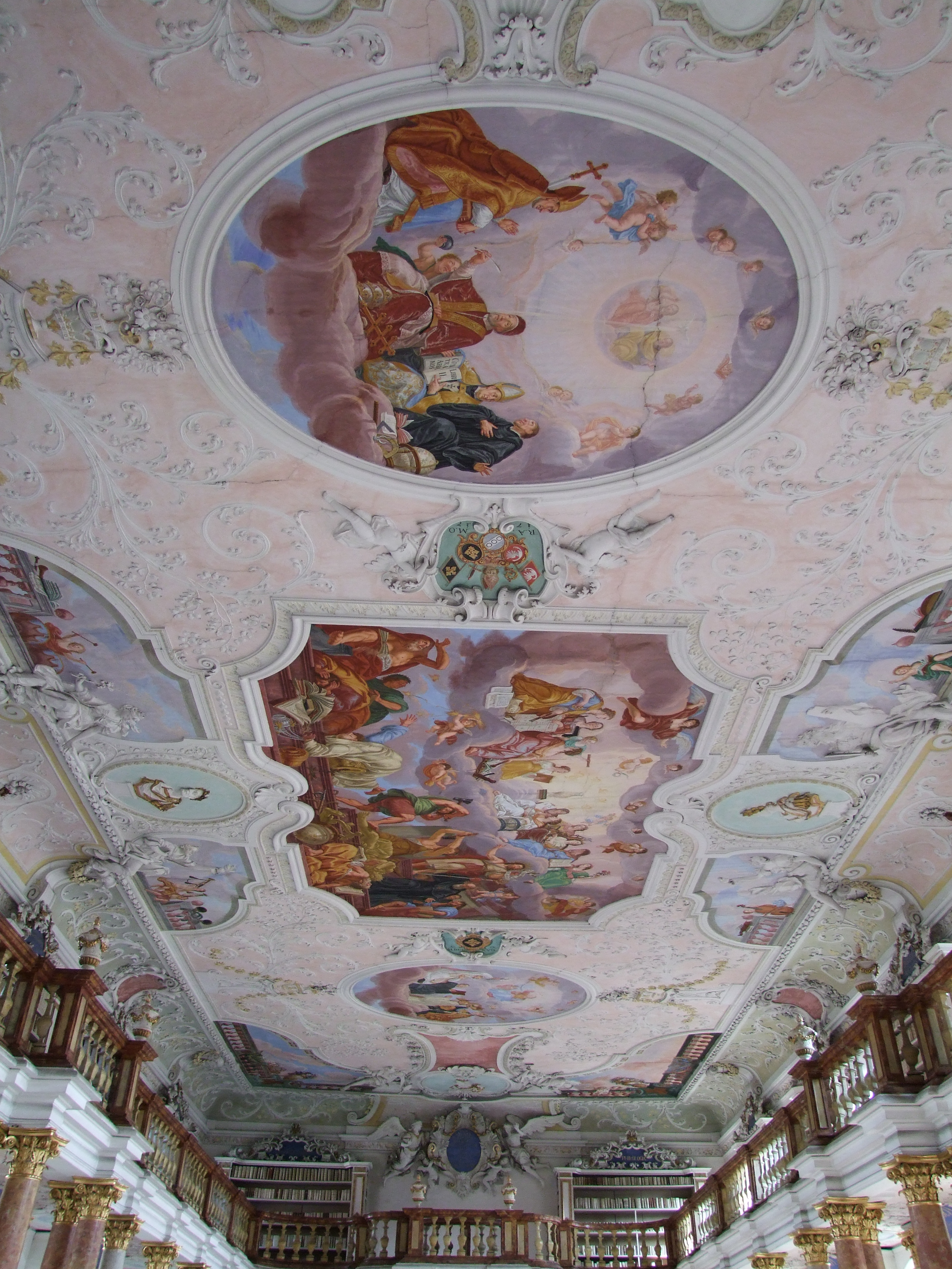 Das Kloster Ottobeuren